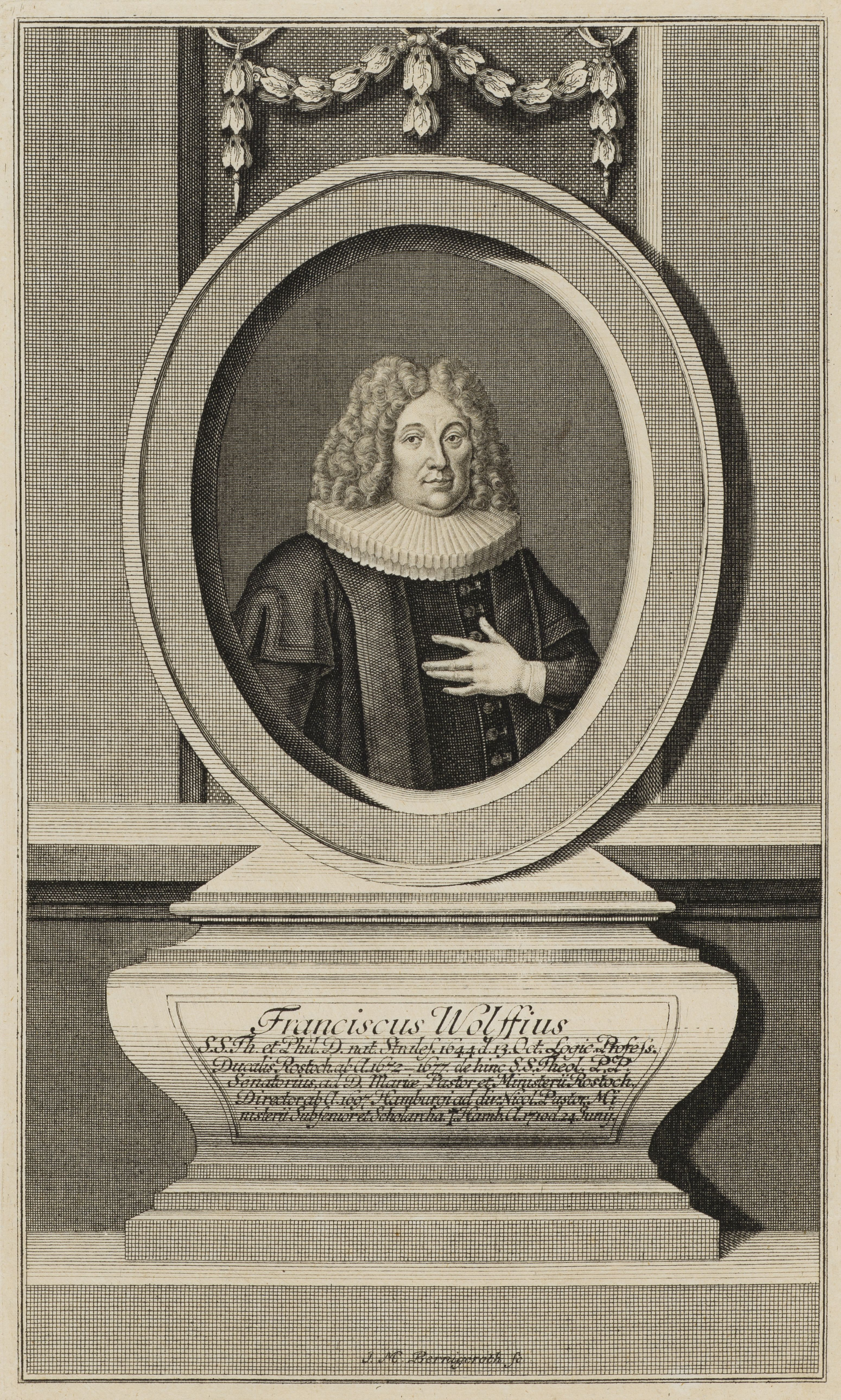 Bildnis von Franciscus Wolff